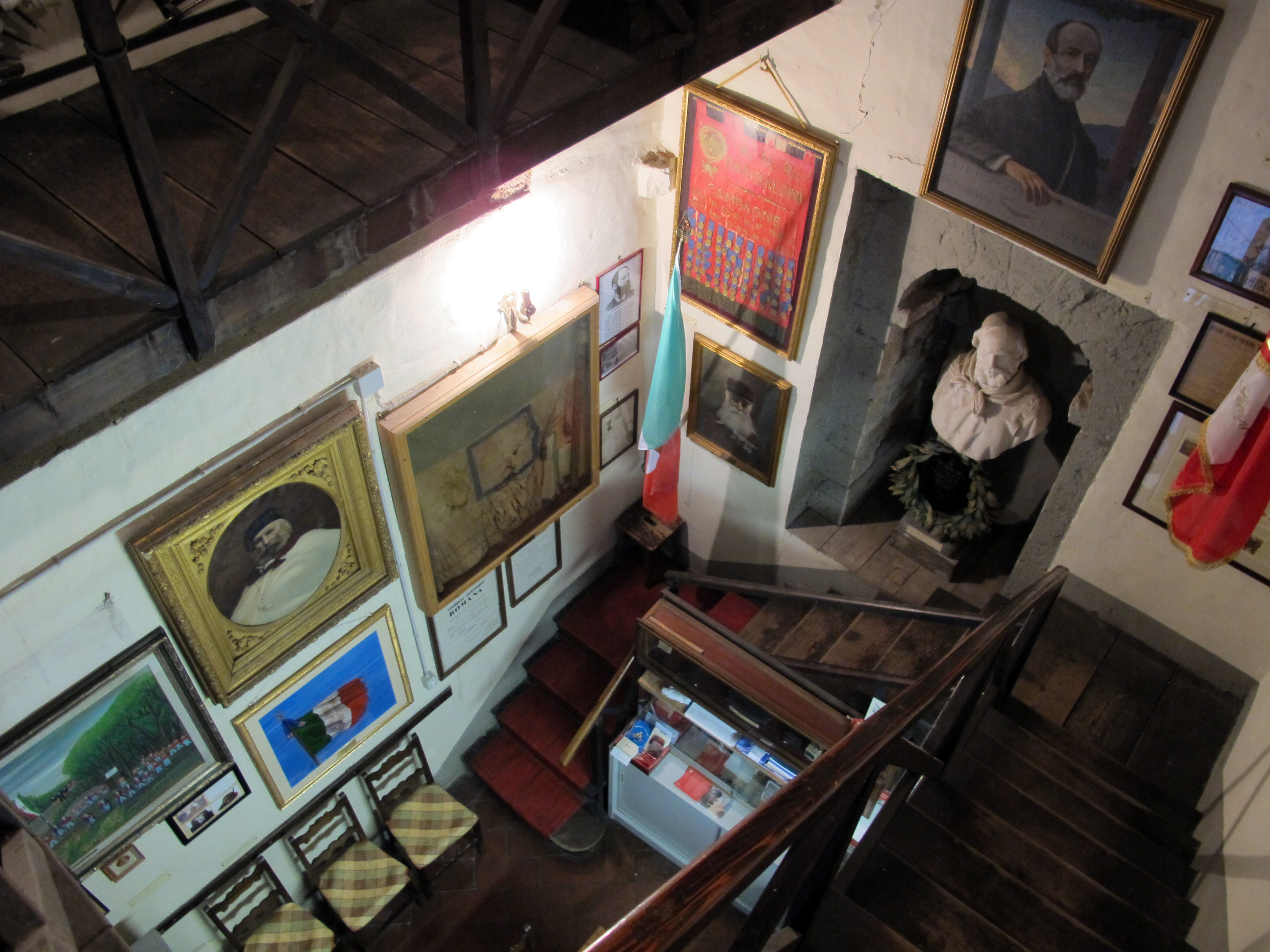 Torre della Castagna